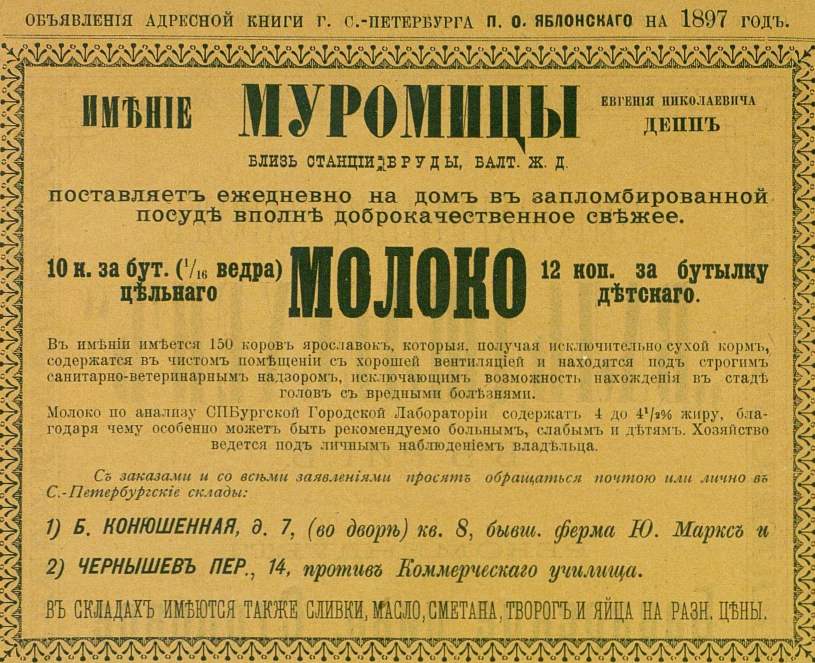 Реклама молока из Муромиц, 1897 год.